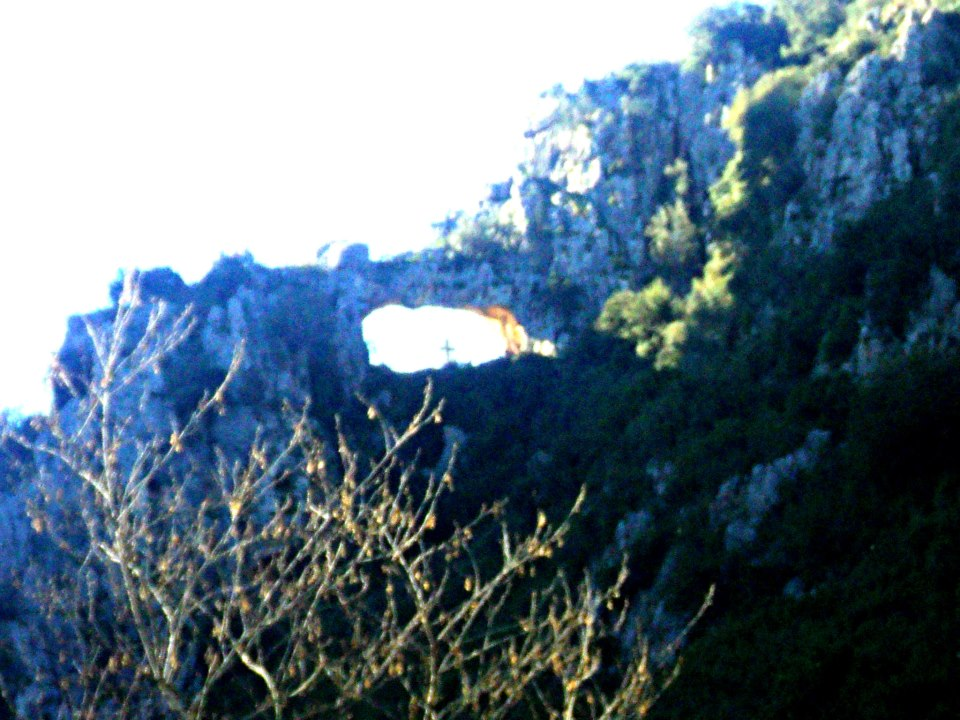 Βραχώδες βουνό σε μορφή τείχους, με τρύπα που το διαπερνά ώστε να είναι ορατή και από τις δύο πλευρές. Στο κέντρο της ένας σταυρός.